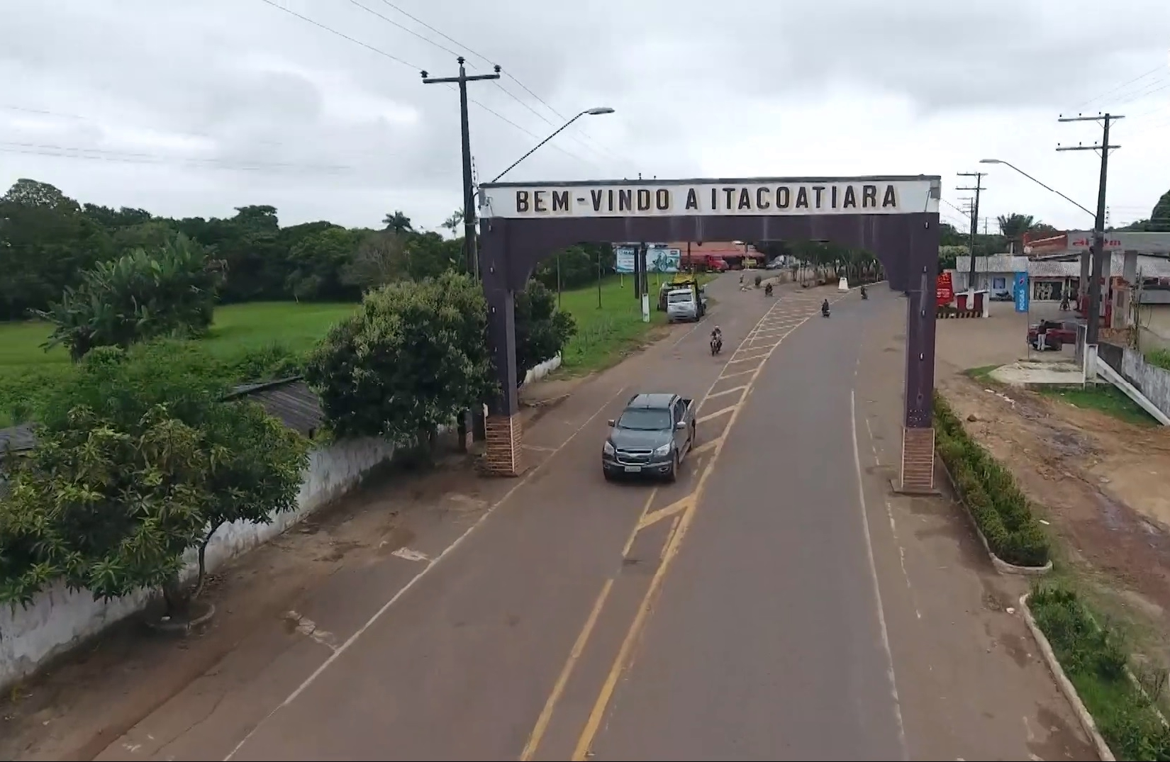 Entrada do município de Itacoatiara, localizado na Região Metropolitana de Manaus, no Brasil.